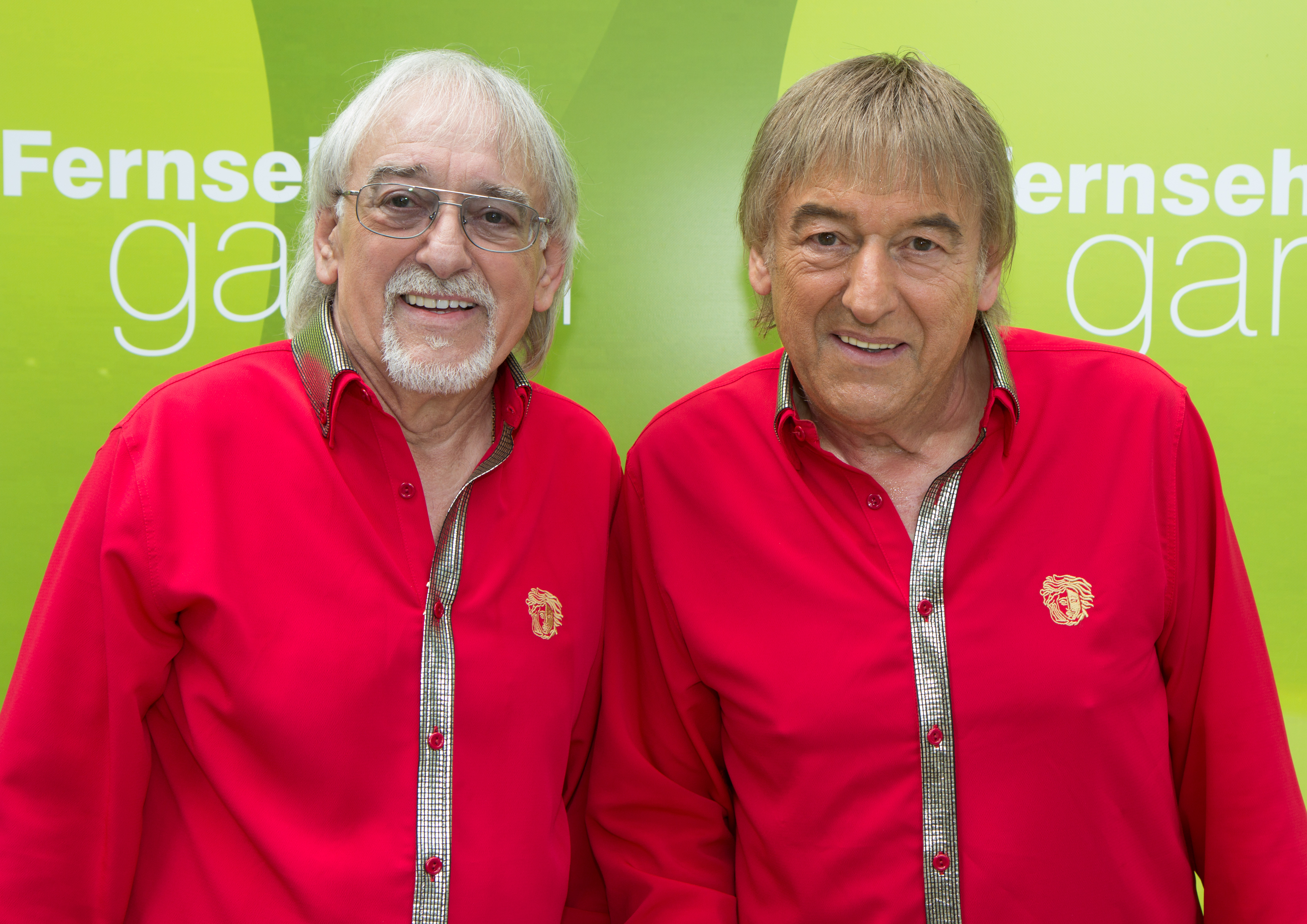 Die Amigos als Gast beim ZDF-Fernsehgarten am 10. Juni 2018 in Mainz.